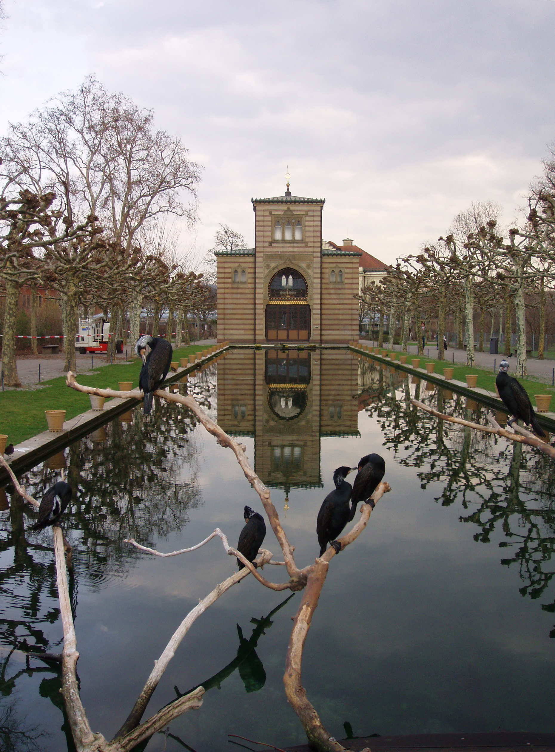 Kormorane vor der Damaszenerhalle in der Wilhelma